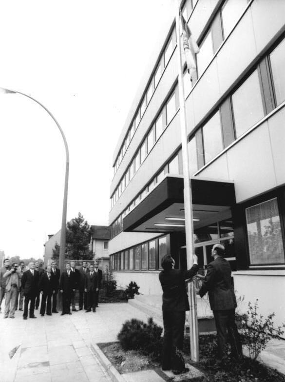 ADN-ZB 21.5.1974 BRD-Bonn Ständige Vertretung der DDR Entsprechend dem Grundlagenvertrag und dem Protokoll vom 14.3.1974 wurde die Ständige Vertretung der Deutschen Demokratischen Republik in der BRD am 2.5.1974 in Bonn eröffnet. Zum amtierenden Leiter wurde Botschaftsrat Hans Bernhardt ernannt. Die Vertretung wird ihren Dienst Anfang Juni 1974 aufnehmen.